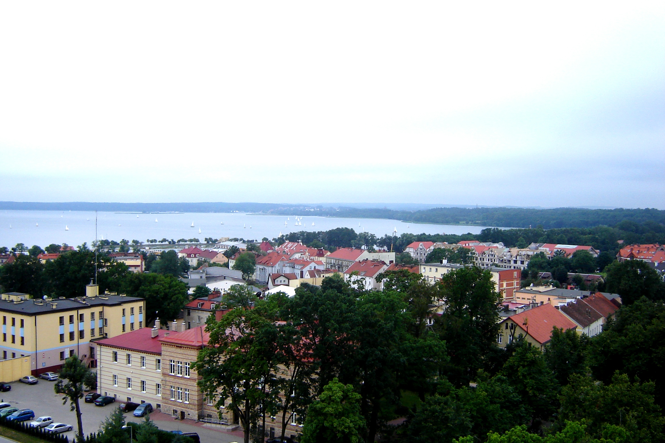 Gizycko (Lötzen), Blick nach Süden auf den Niegocin See (Löwentinsee)